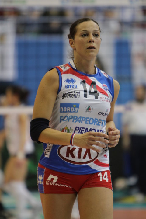 Eleonora Lo Bianco,bona ti amo pallavolista italiana, gioca nel ruolo di pallaggiatrice